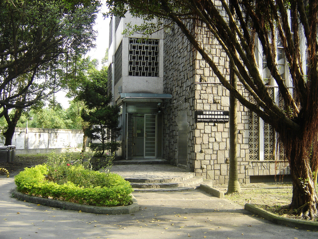 輔大民生學院 兒家系